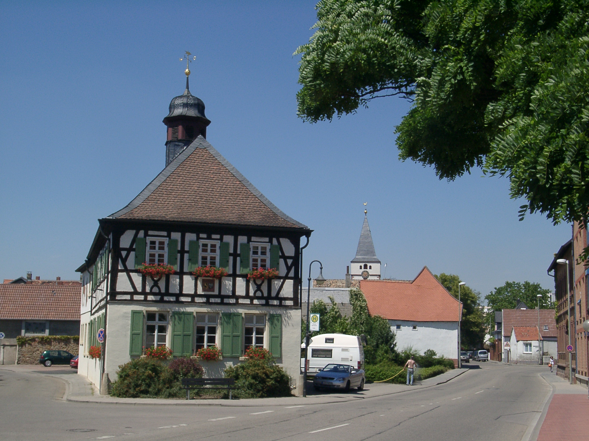 Straßenbild in Mutterstadt - selbst fotografiert (Klaus Graf) 23.6.2005